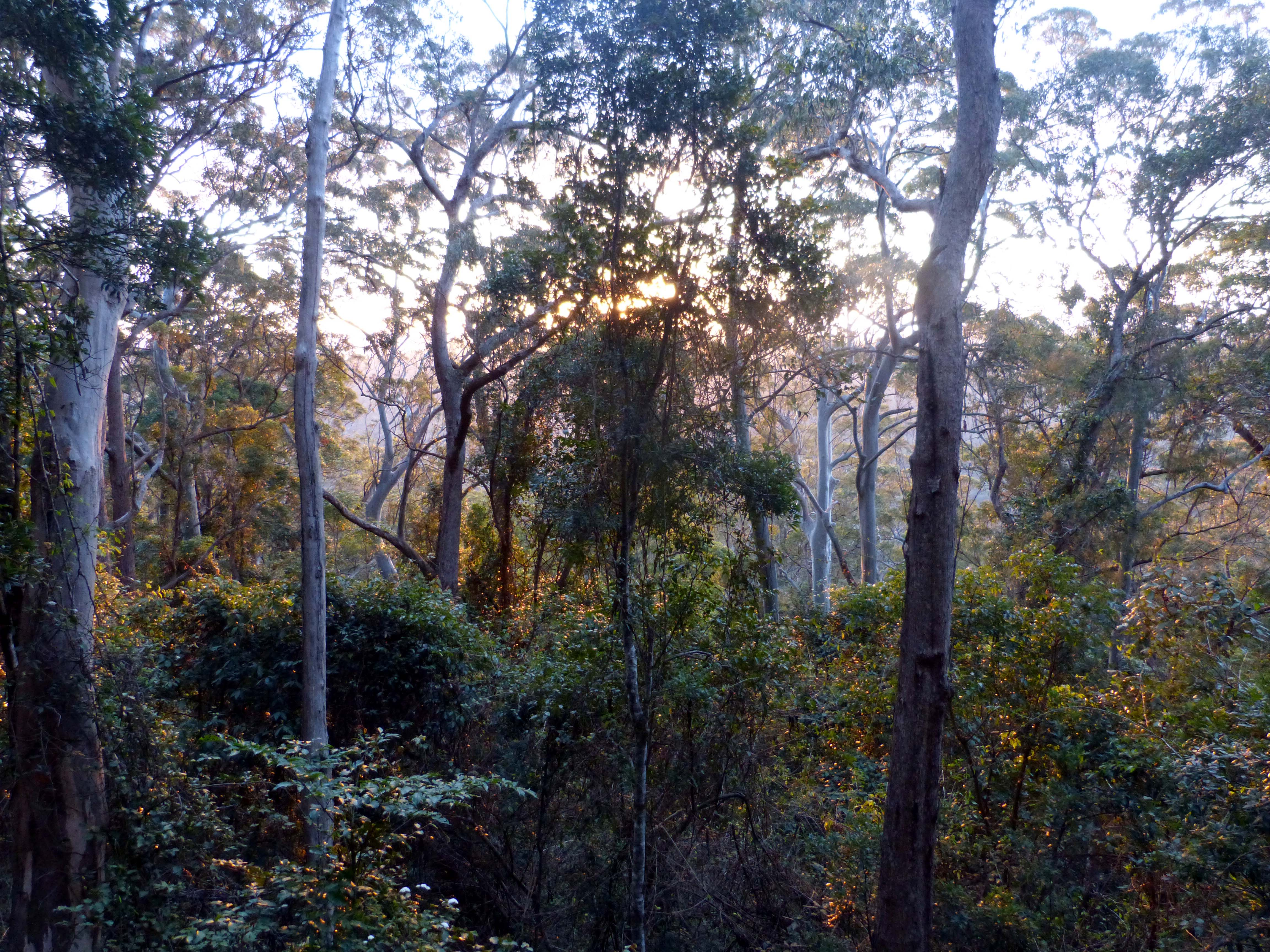 Sunset , Binna Burra rainforest